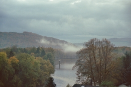 Aare bei Umiken mit Blick auf die Habsburg